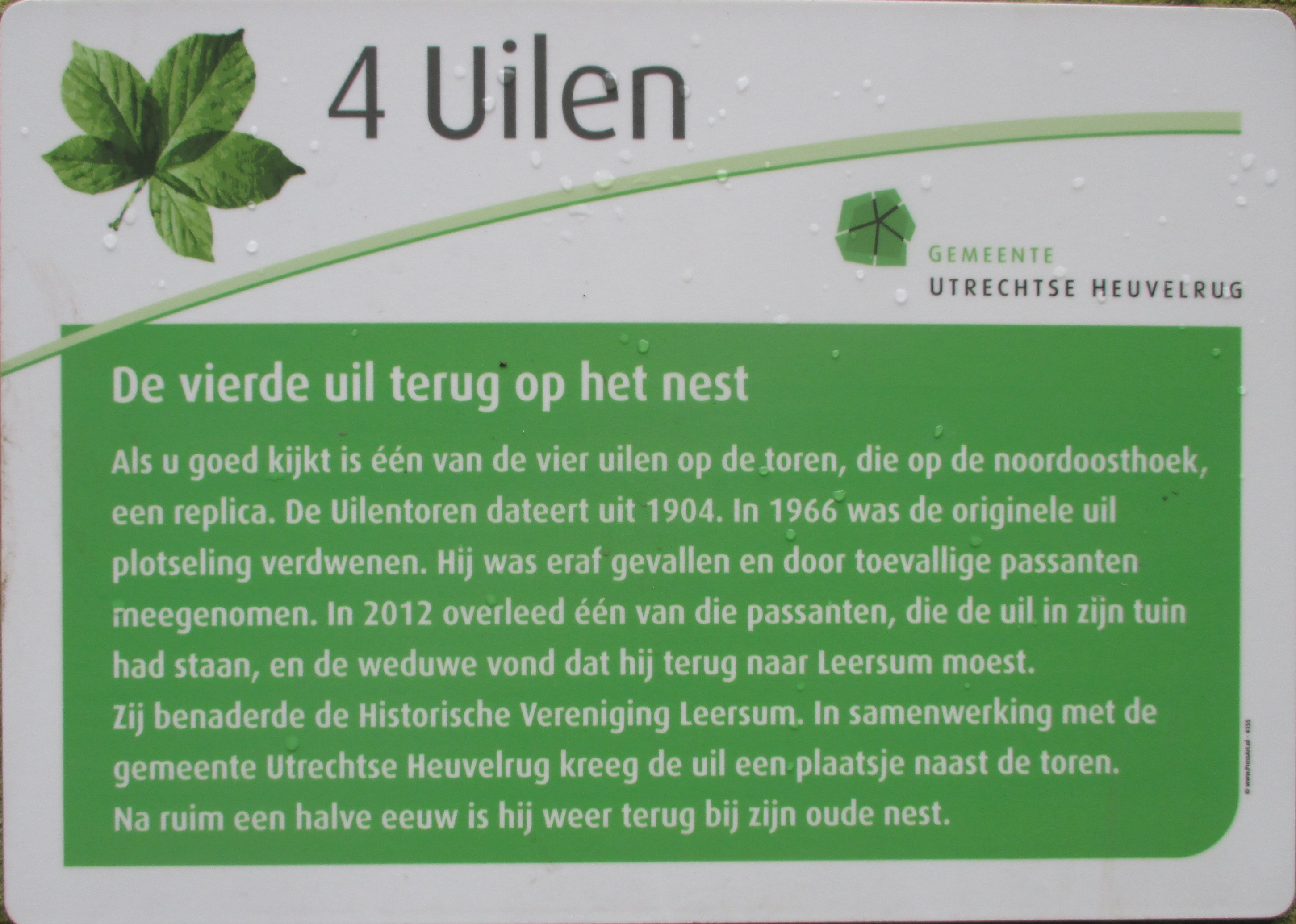 Plaquette met uitleg over de teruggevonden vierde uil op de Uilentoren Leersum. Deze vierde uil is lange tijd verdwenen geweest. Een vervangen op de toren door een replica.